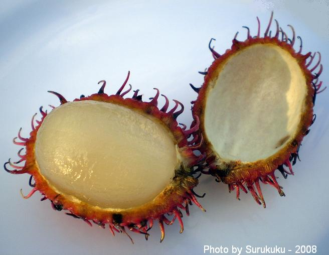 Rambutan Fruit Open